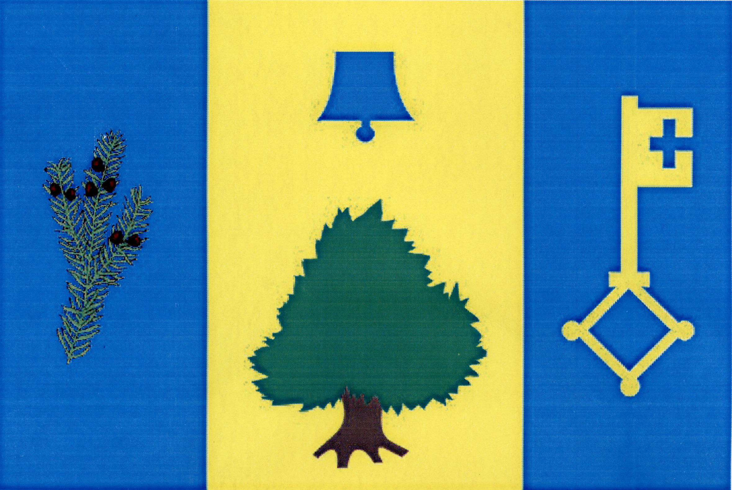 Vlajka obce Vilémovice (okres Havlíčkův Brod)